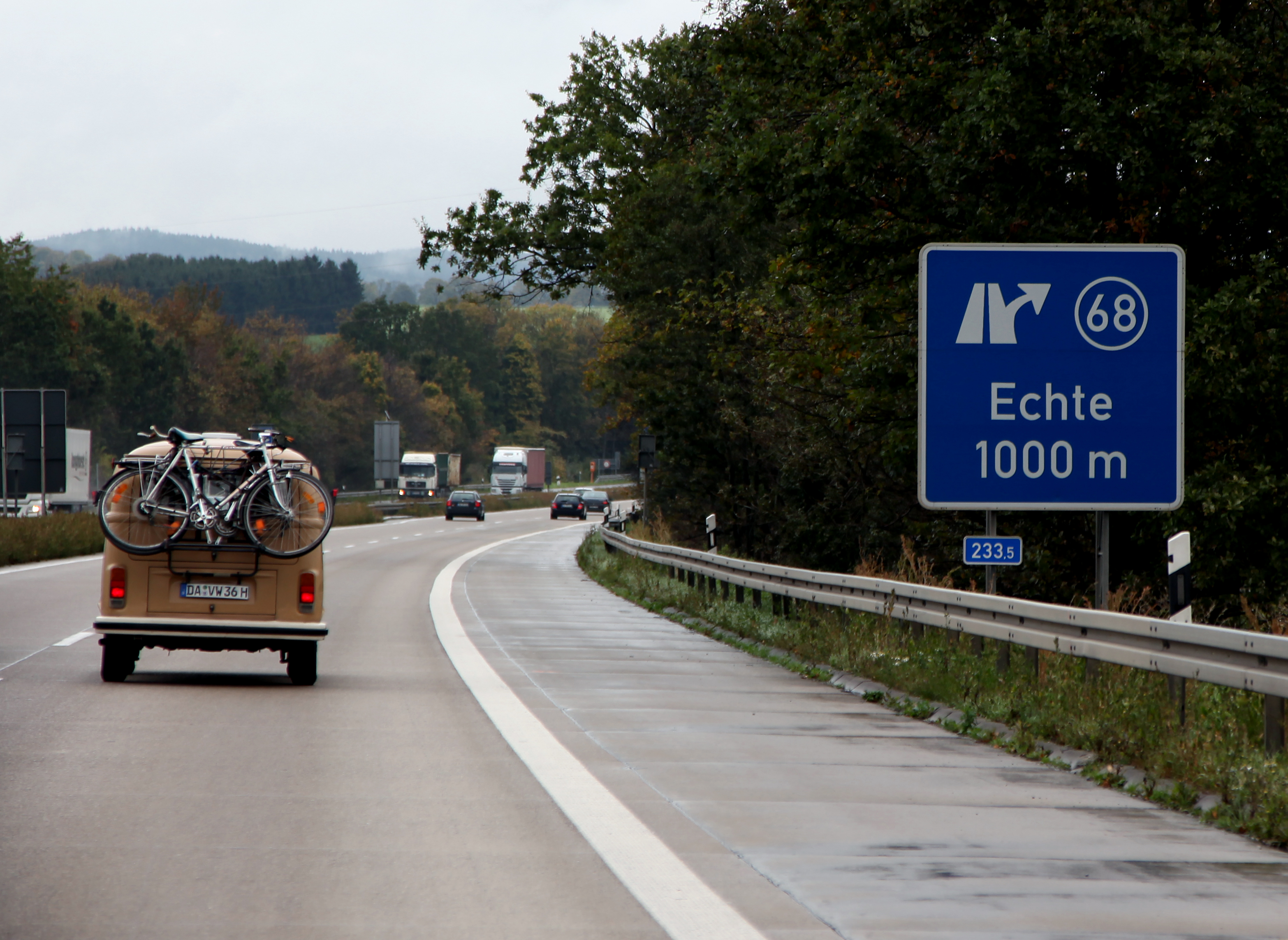 Ankündigung der Abfahrt Echte, Niedersachsen in 1000 m auf der BAB 7, Fahrtrichtung Norden (Kassel → Hannover), Autobahnkilometer 233,5.